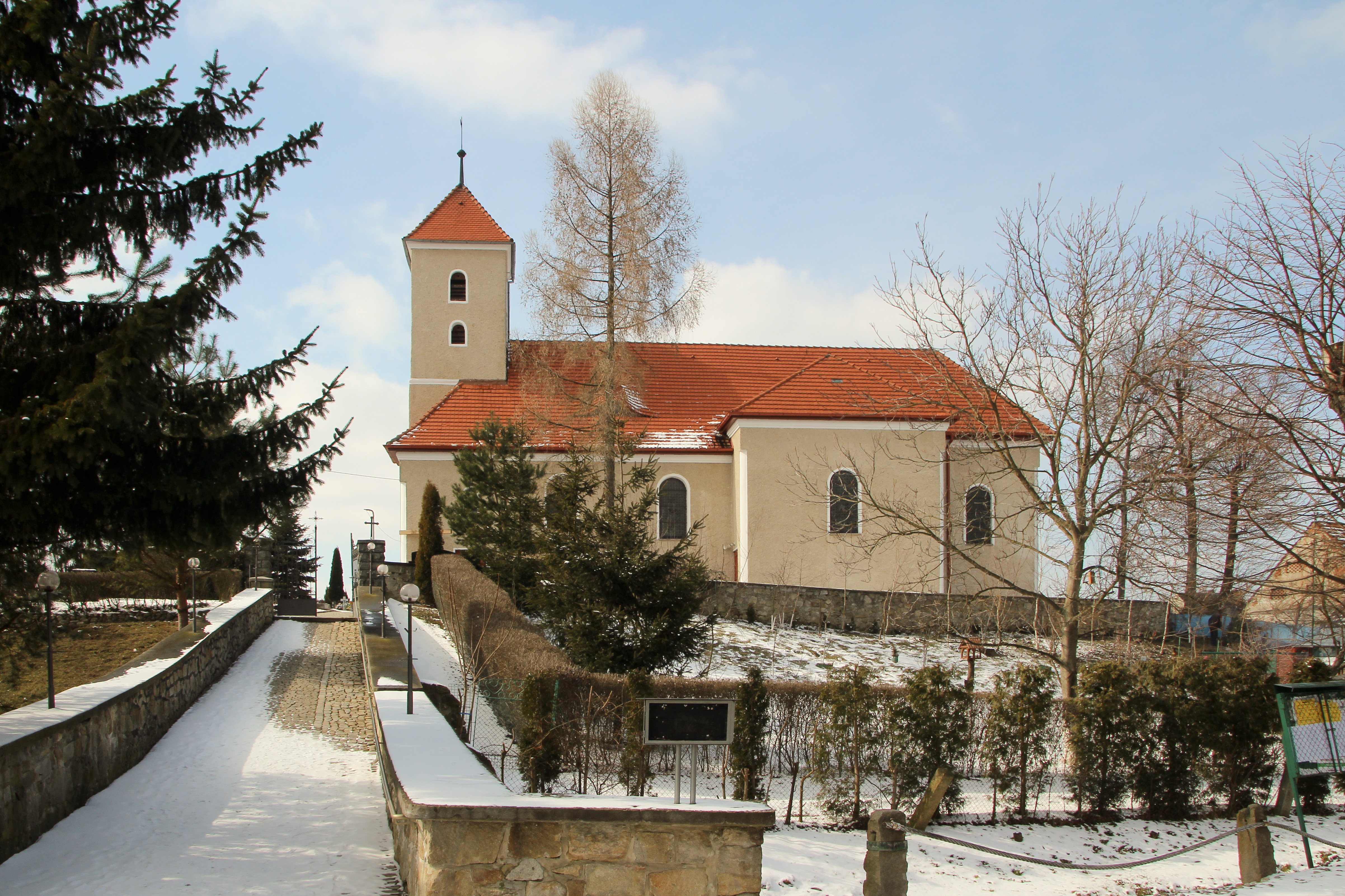 Jarnołtów – kościół rzymskokatolicki p.w. Podwyższenia Krzyża Świętego